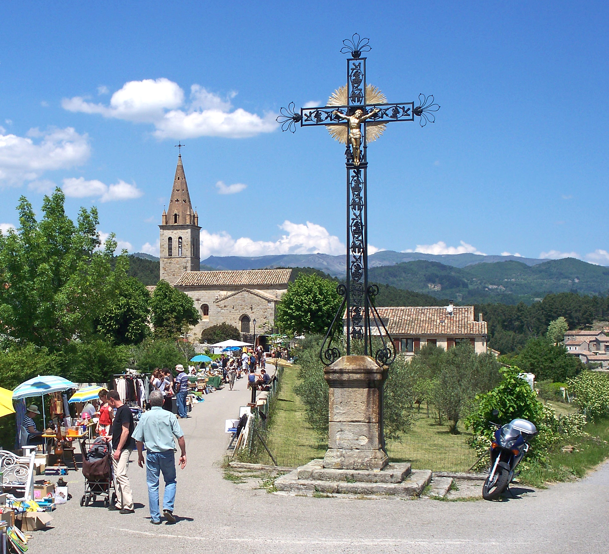 Saint Julien de Serre et sa brocante du Lundi de Pentecôte